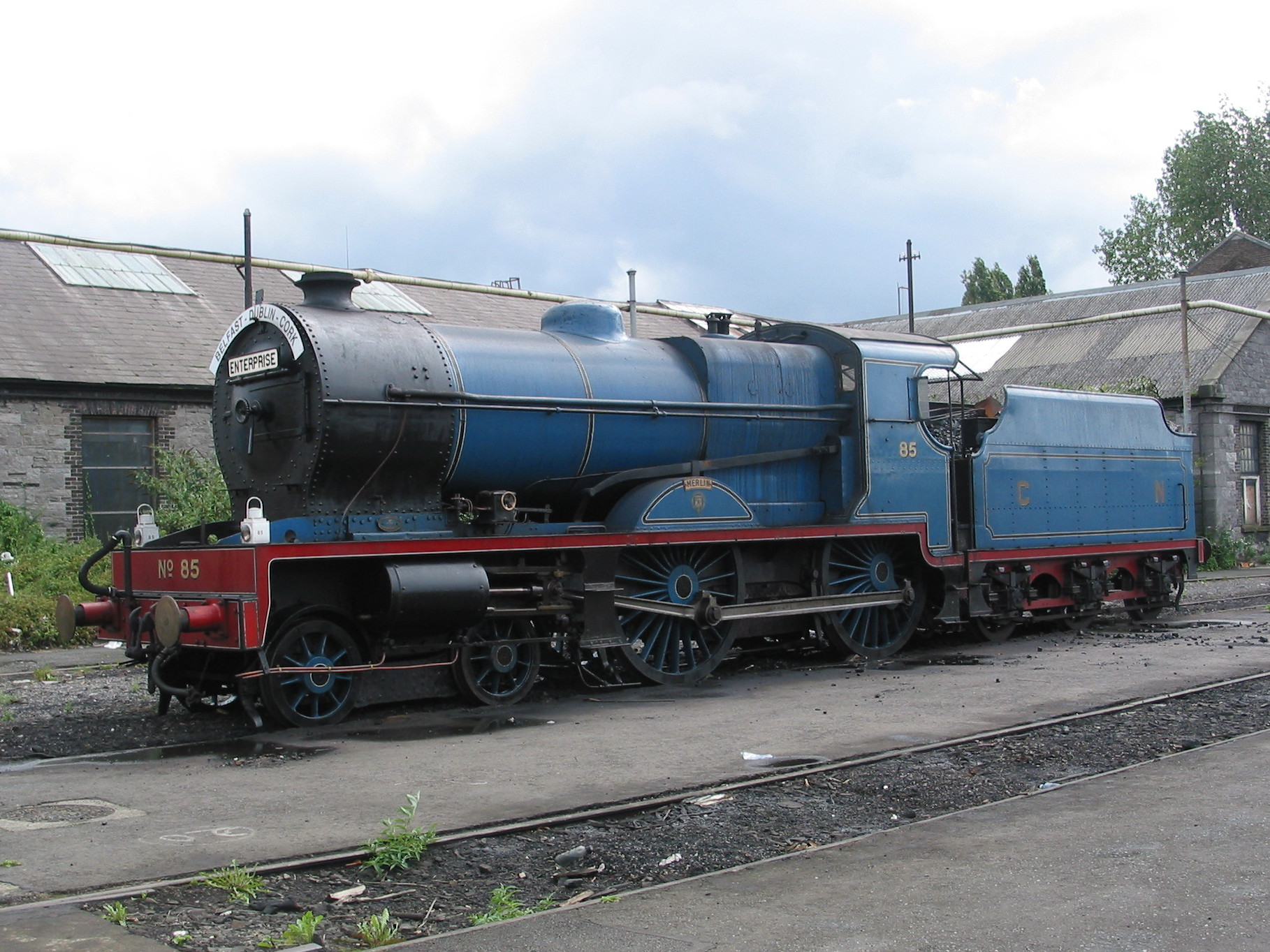 Great Northern Railway (Ireland) Nummer 85 Merlin (Reihe V) in Dublin im Inchicore Railway Works